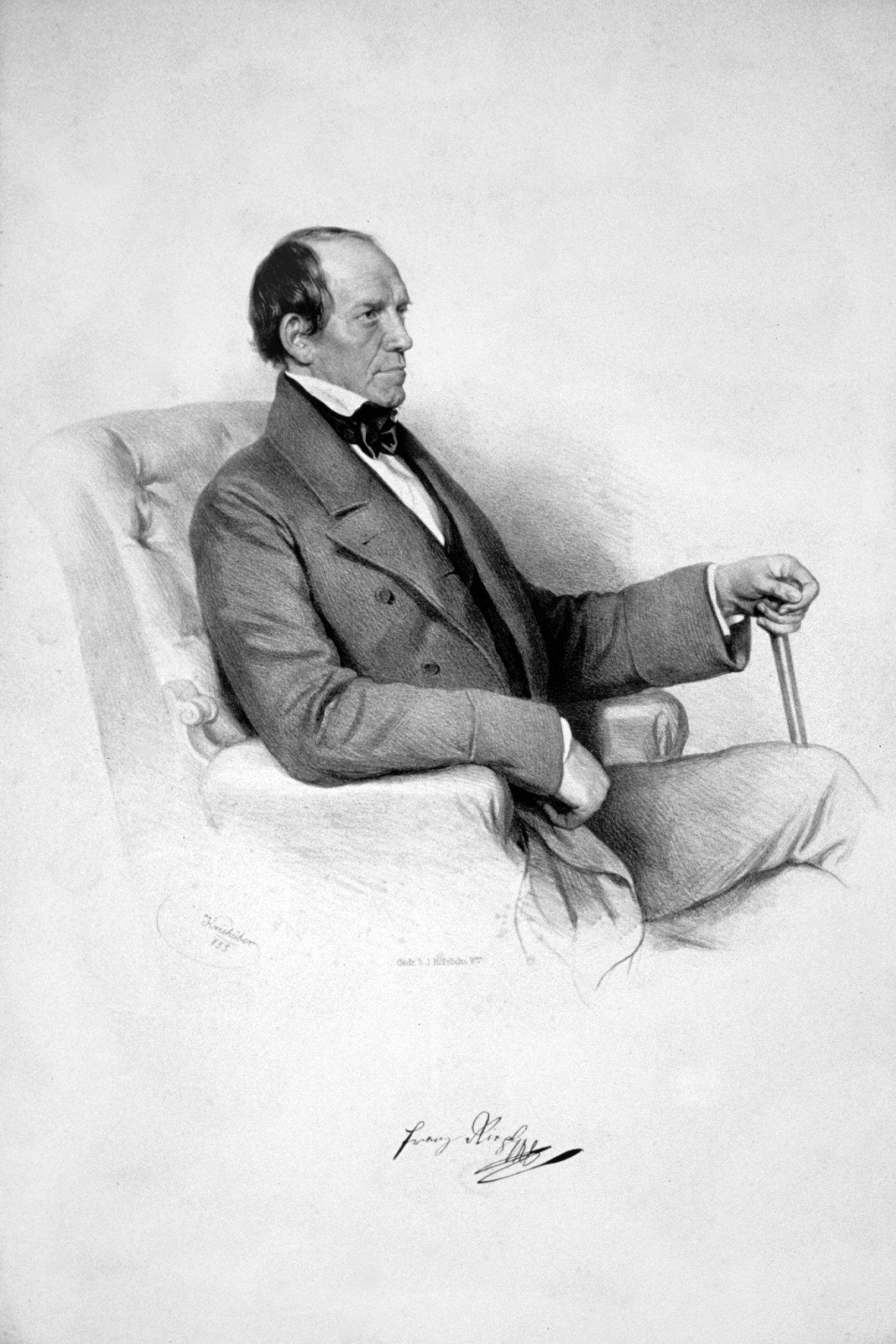 Franz Xaver Riepl (1790-1857), österreichischer Geologe, Eisenbahnpionier und Hüttenfachmann.